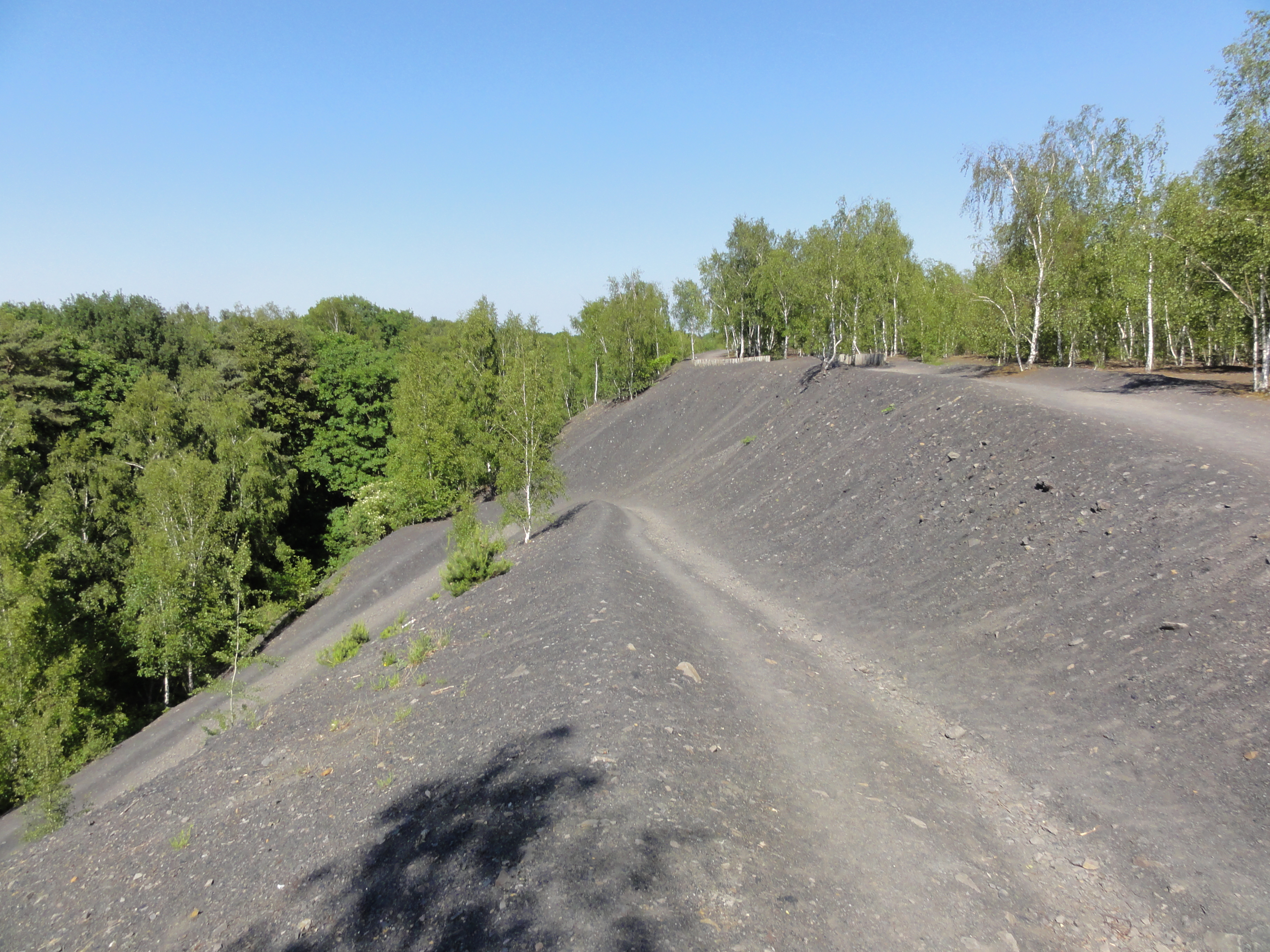 Terril n° 171 dit Mare à Goriaux, fosse Arenberg de la Compagnie des mines d'Anzin dans le bassin minier du Nord-Pas-de-Calais, Wallers et Raismes, Nord, Nord-Pas-de-Calais, France. Le terril no 171 est inscrit sur la liste du patrimoine mondial de l'Unesco le 30 juin 2012 et y constitue en partie le site no 15.